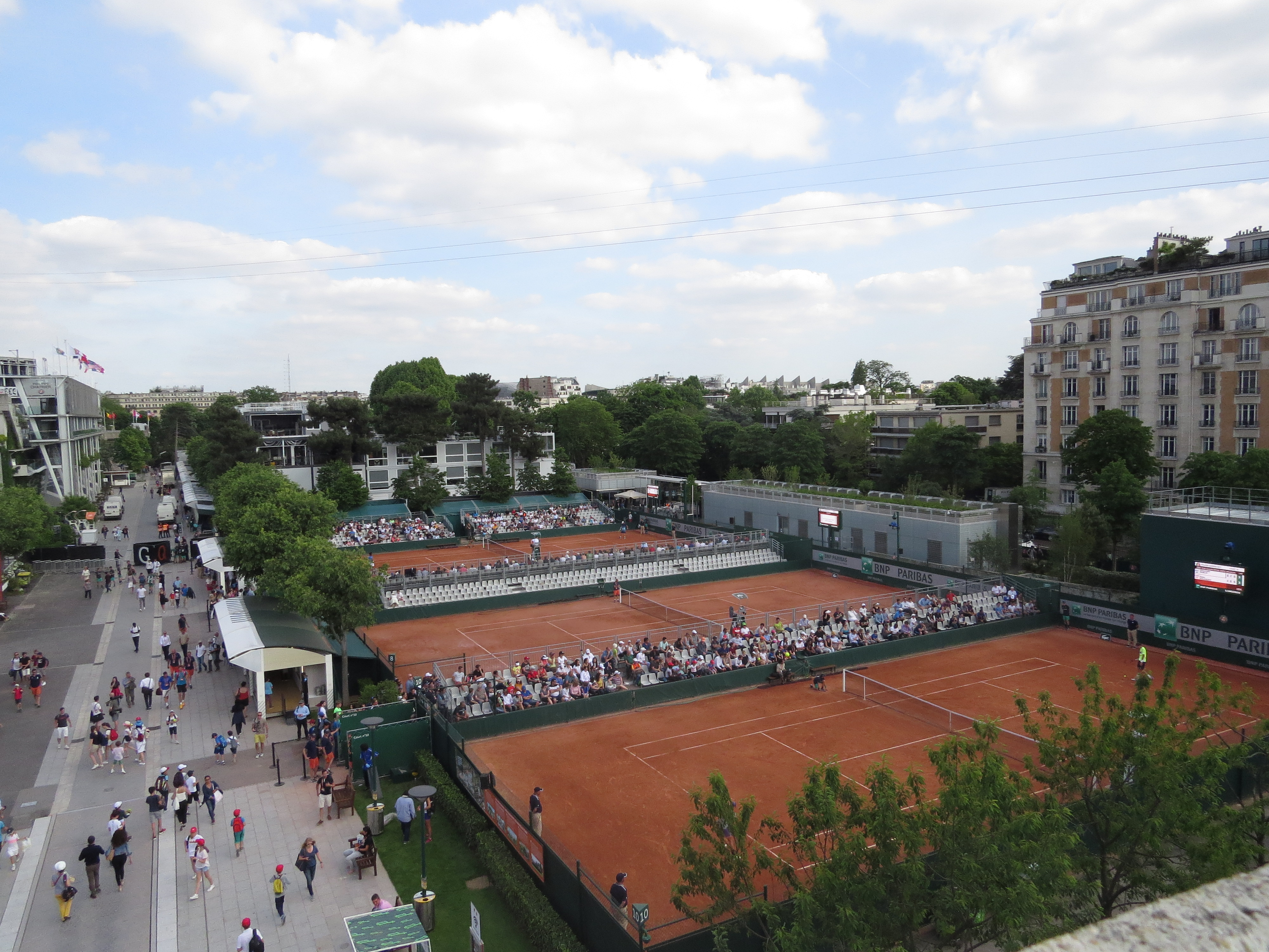 Vue des courts annexes depuis le Suzanne Lenglen